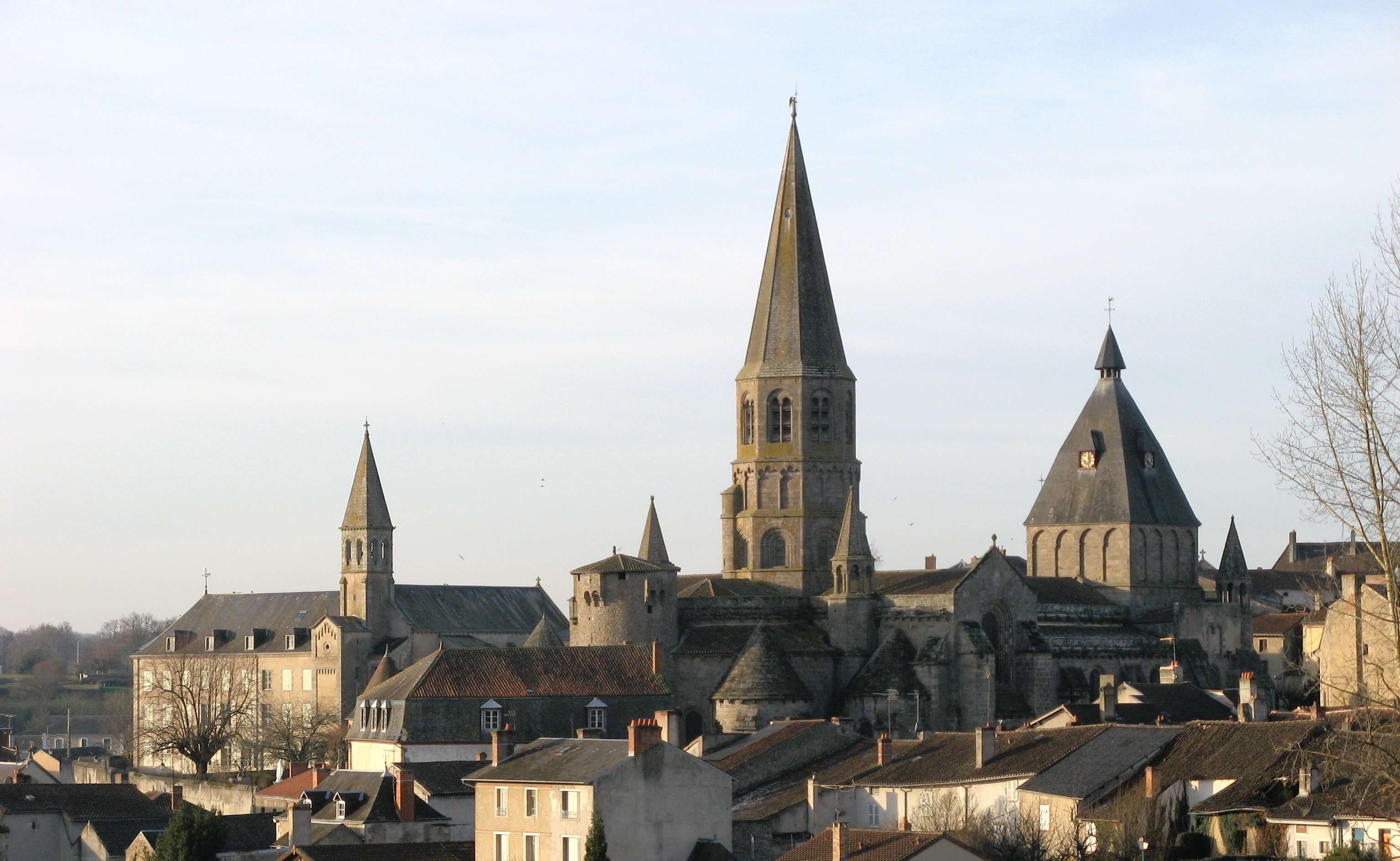 Le Dorat (Haute Vienne). Vue générale.